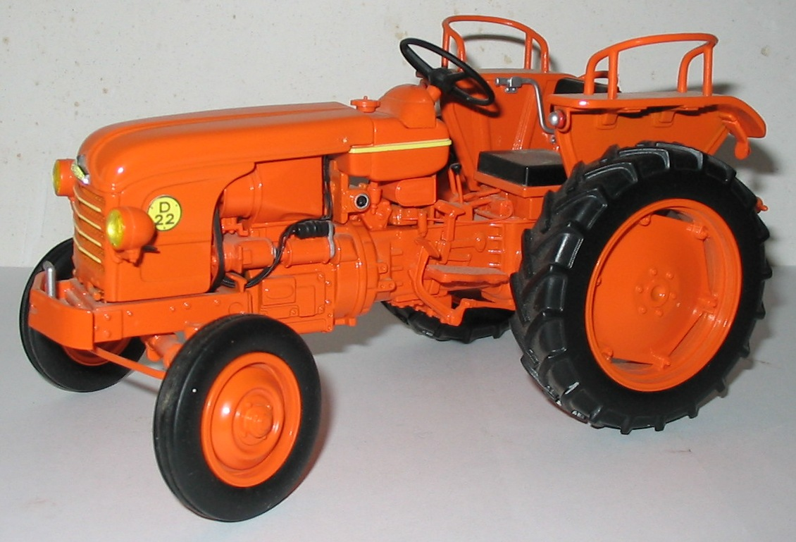 Tracteur Renault D22 de 1957